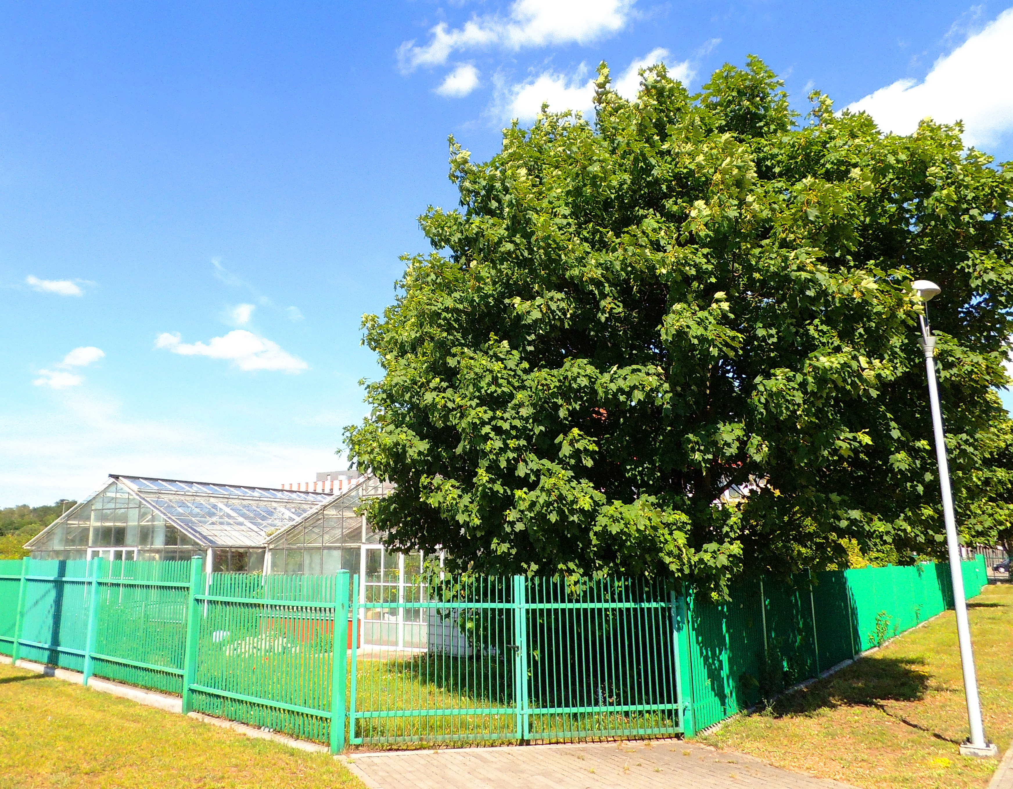 Zaplecze Hodowlane UMK w Toruniu